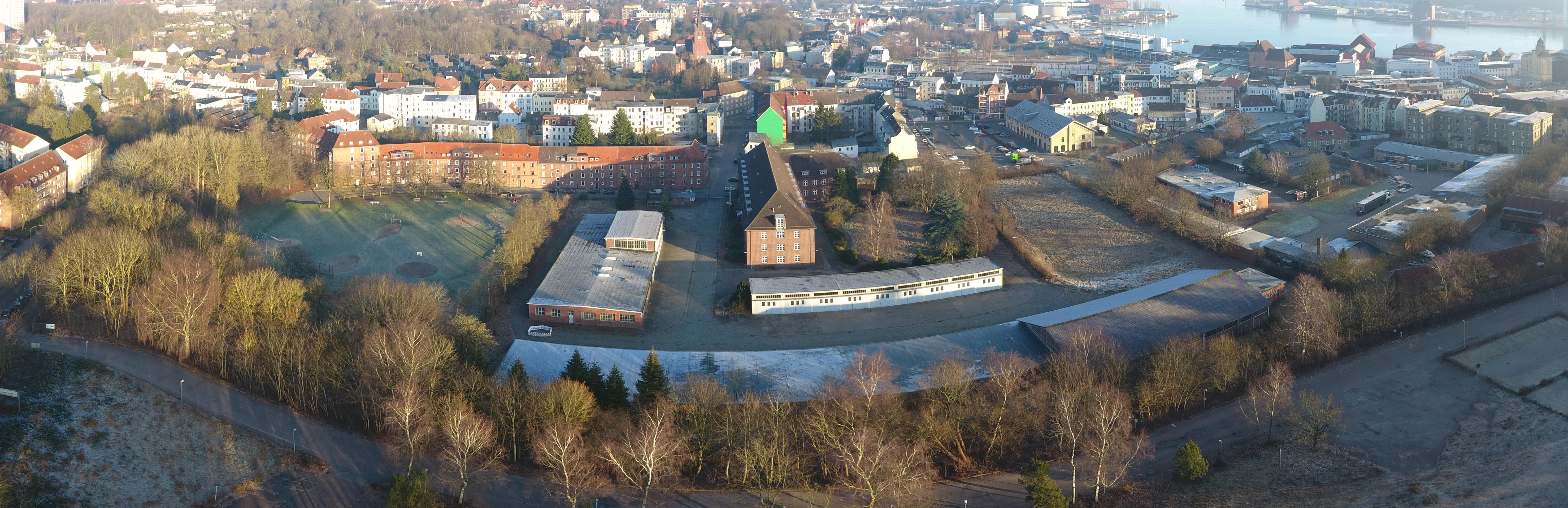 Blick auf die alte Panzerkaserne in der Flensburger Neustadt